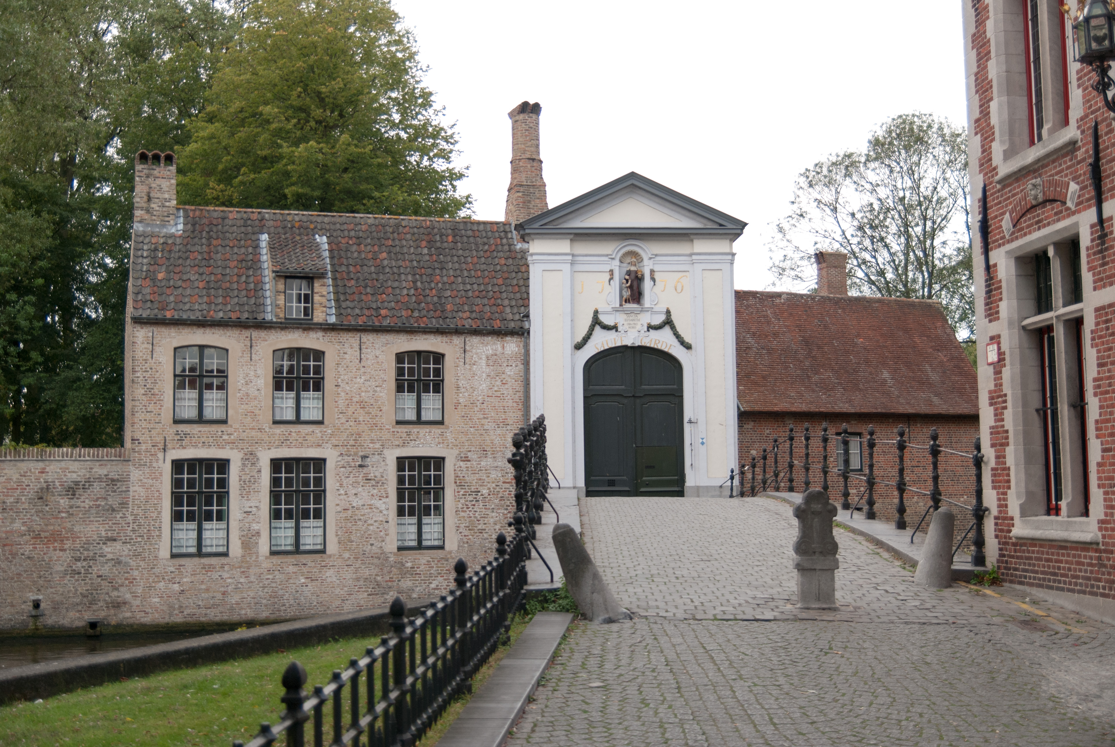 Begijnhofpoort en Begijnhofbrug, ook Wijngaardbrug, Brugge